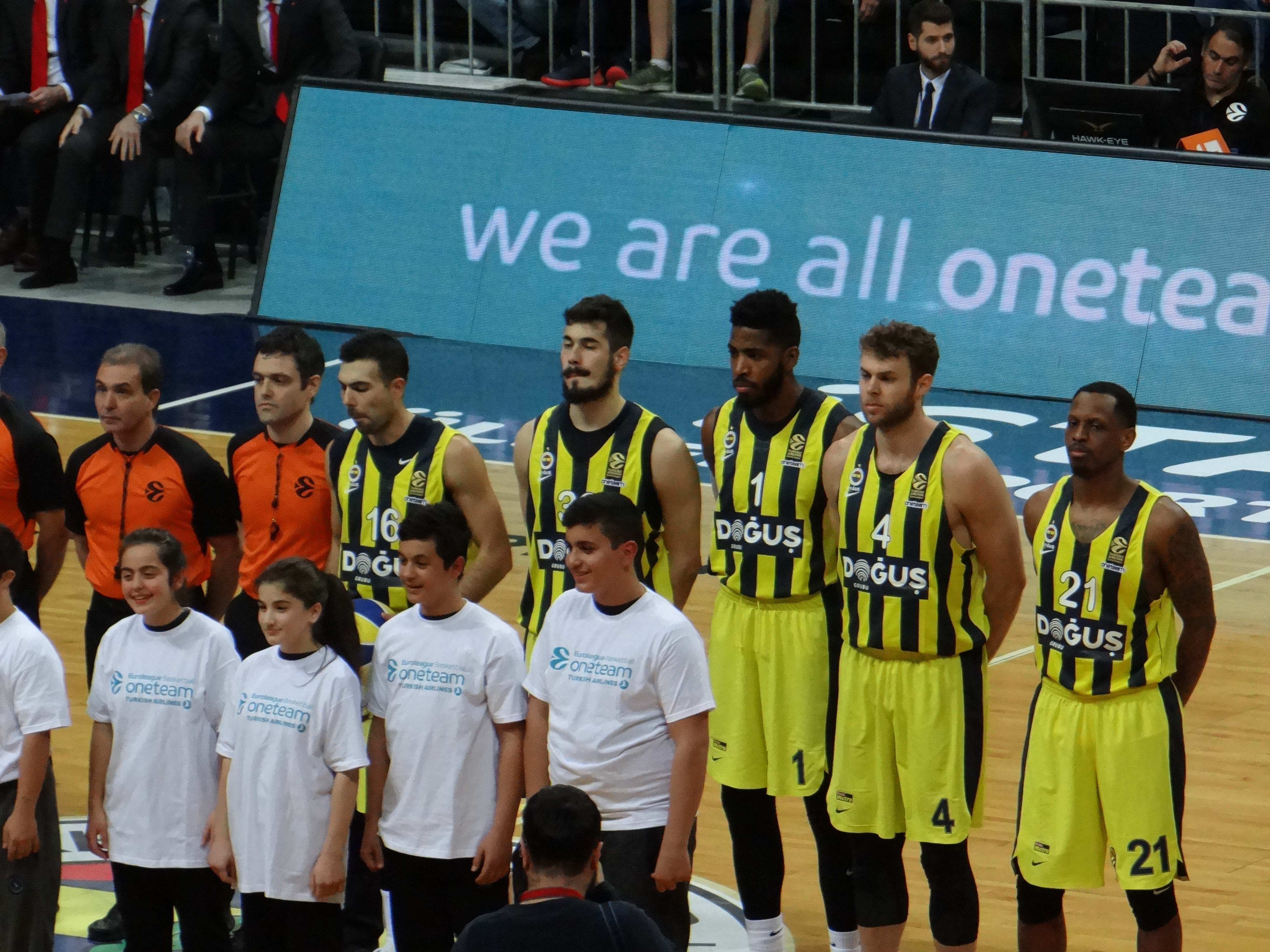 Fenerbahçe Doğuş vs KK Crvena zvezda EuroLeague 20171219